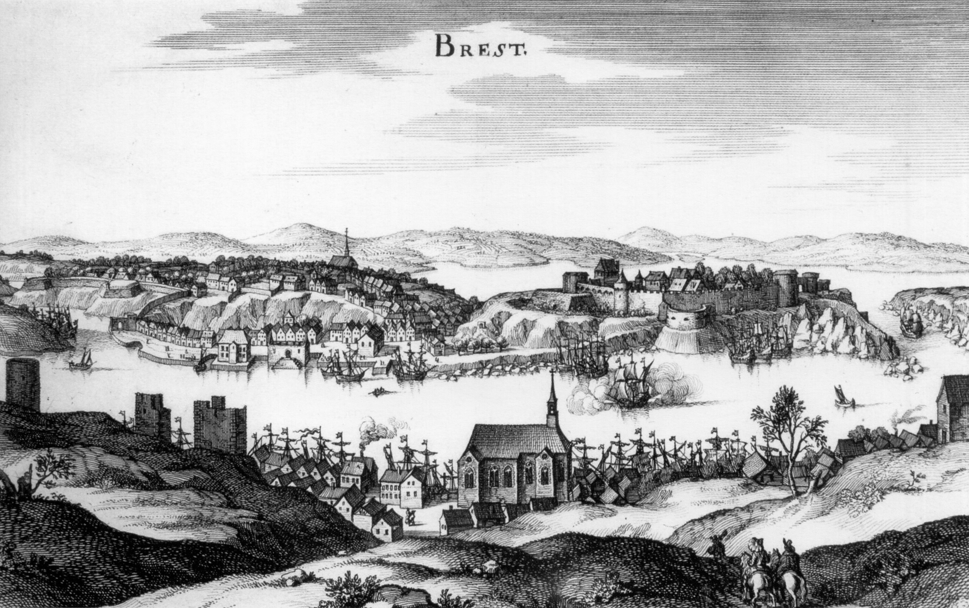 Eau-forte 20,5x30,5 (gravée par Peeters)